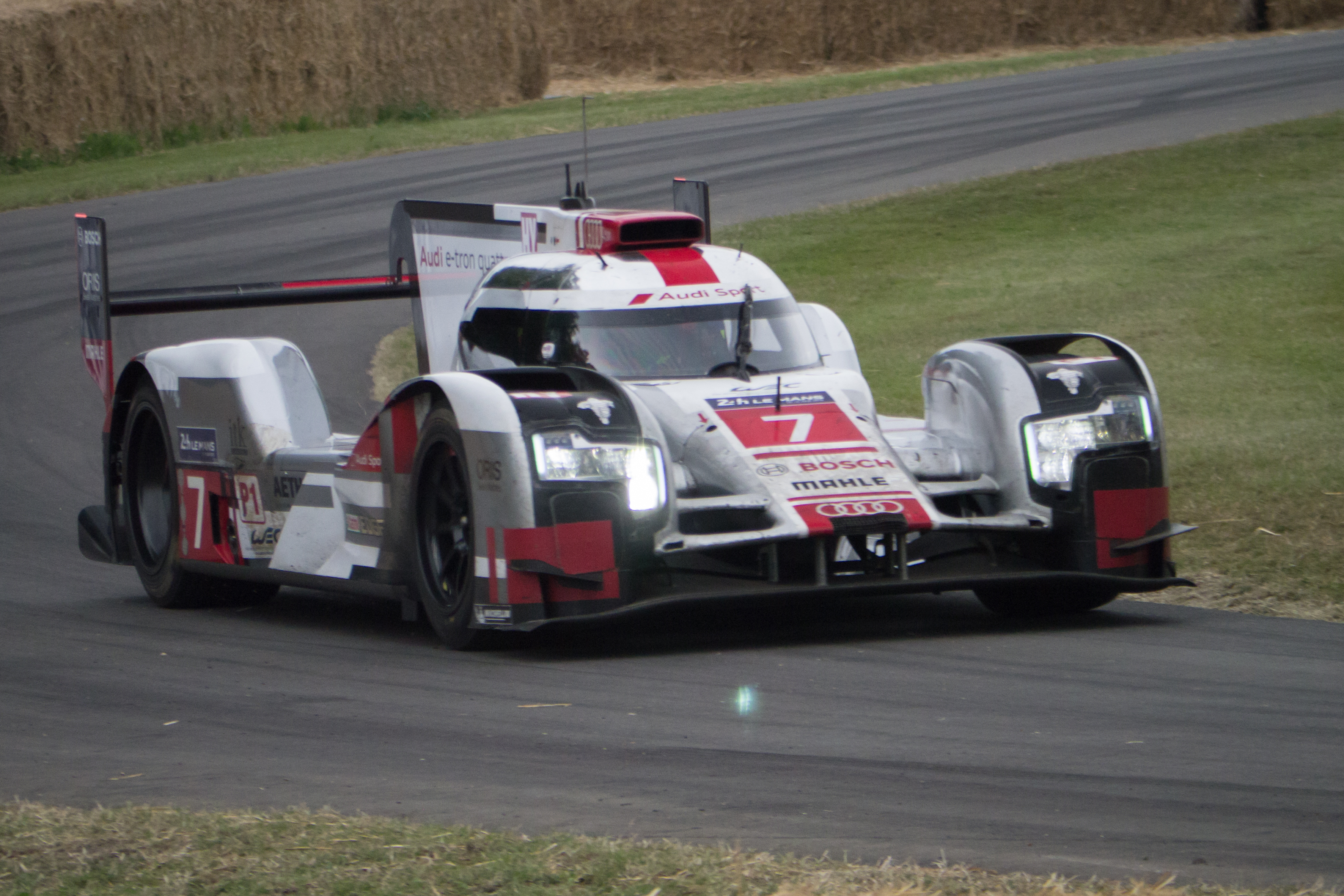 2015 Audi R18 E-Tron Quattro